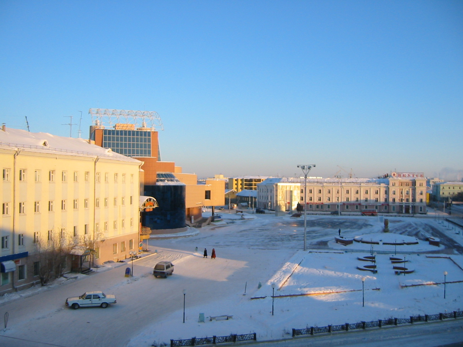 Theater in Jakutsk (Yakutsk), Russia.